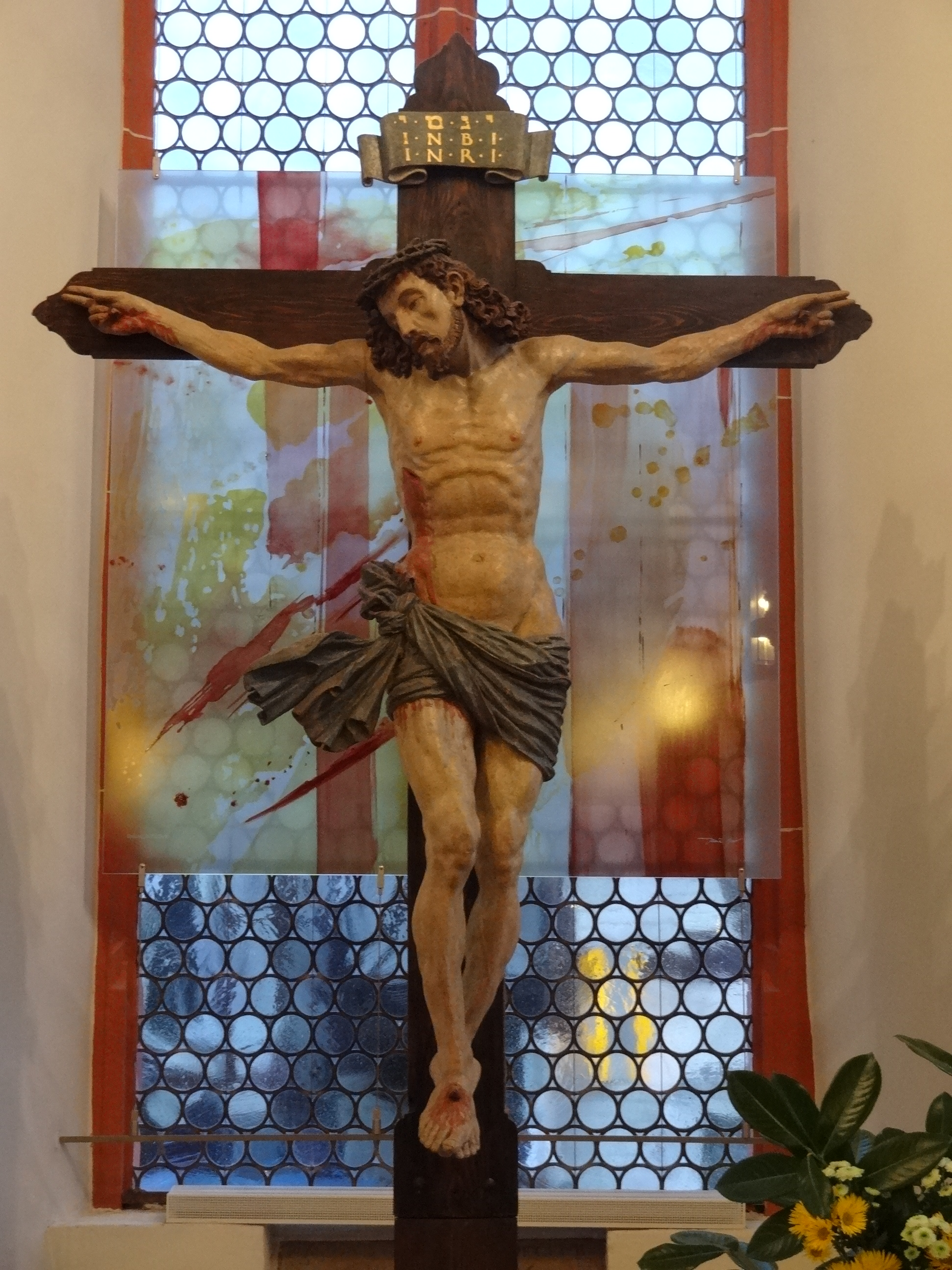 Stadtkirche zum Heiligen Geist (Nidda)